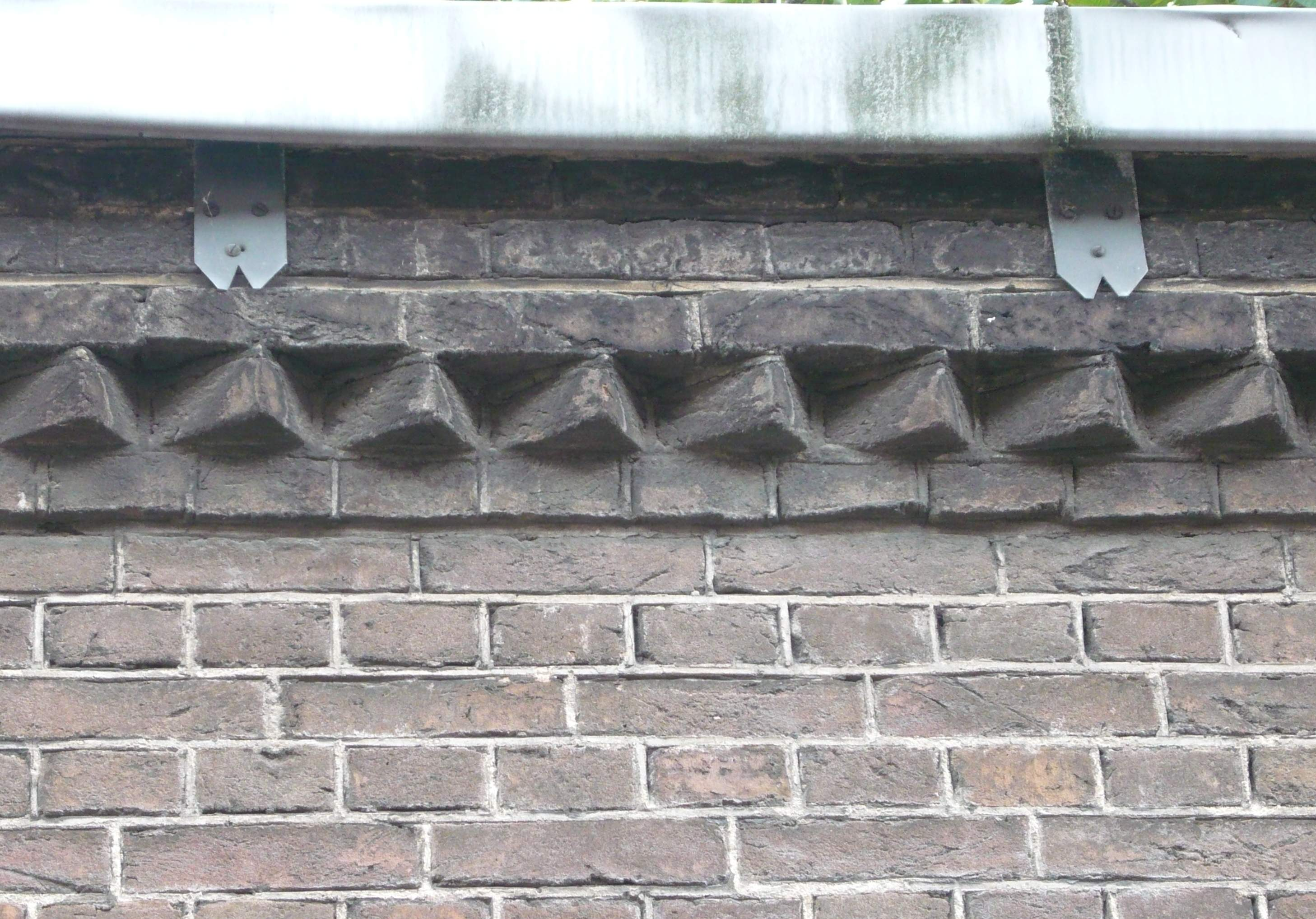 Muizentanden, een bepaald soort metselwerk die (in dit geval) bestaat uit een rij schuingeplaatste bakstenen in een buitenmuur.